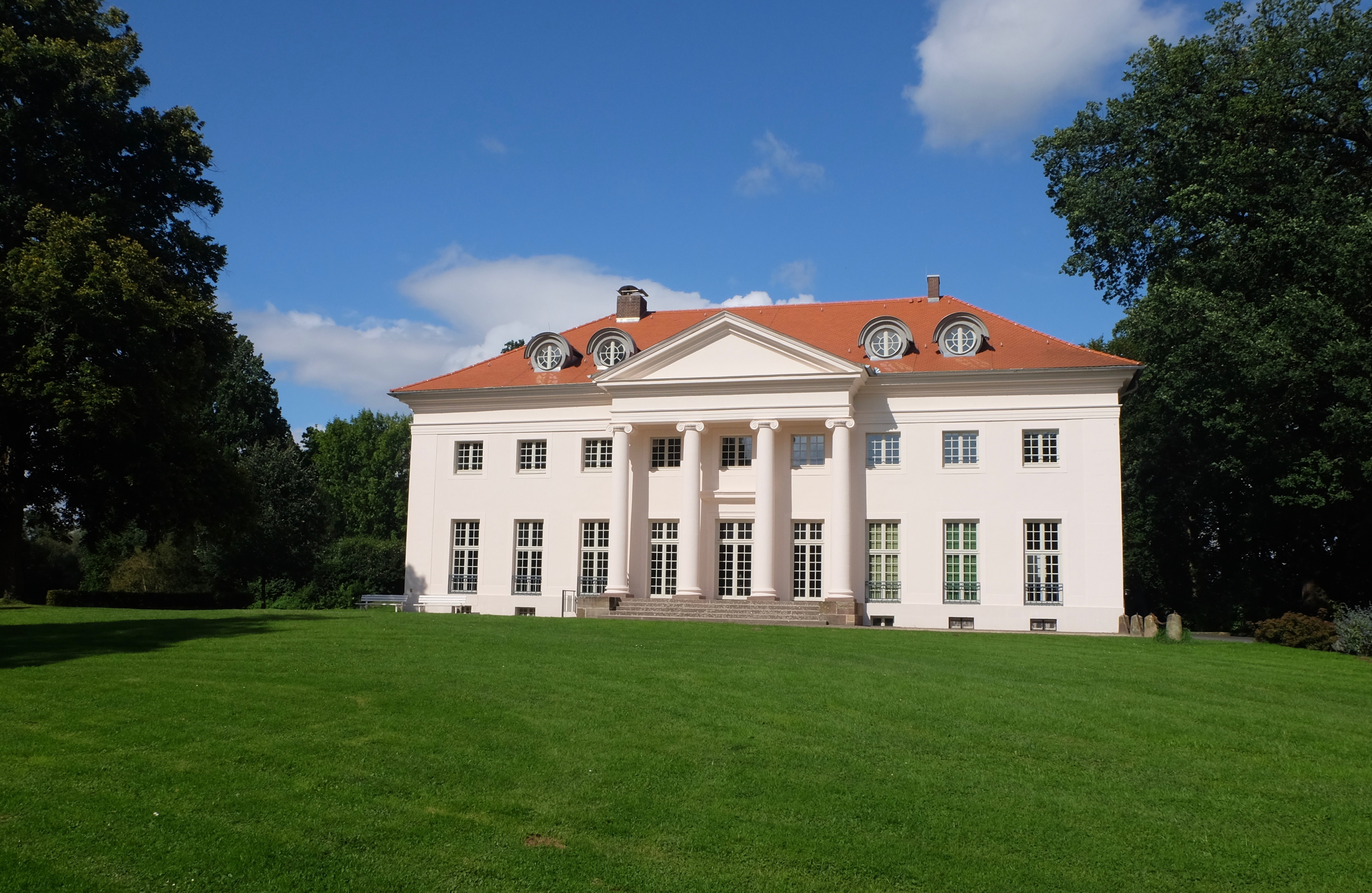 Schloss Schönburg im Gesundbrunnen Hofgeismar nach der Sanierung